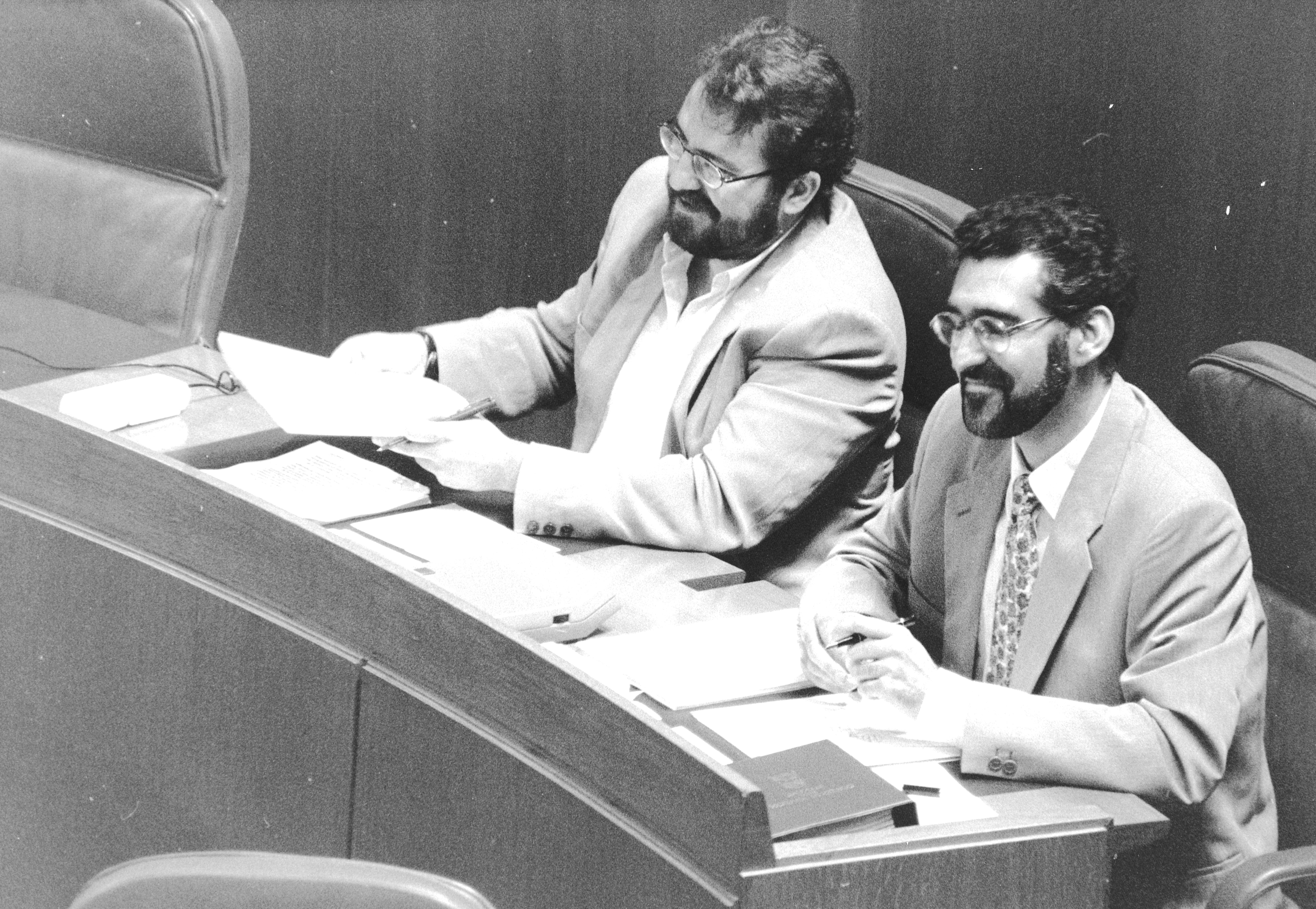 Sesión Investidura de las Cortes 7 de julio de 1995